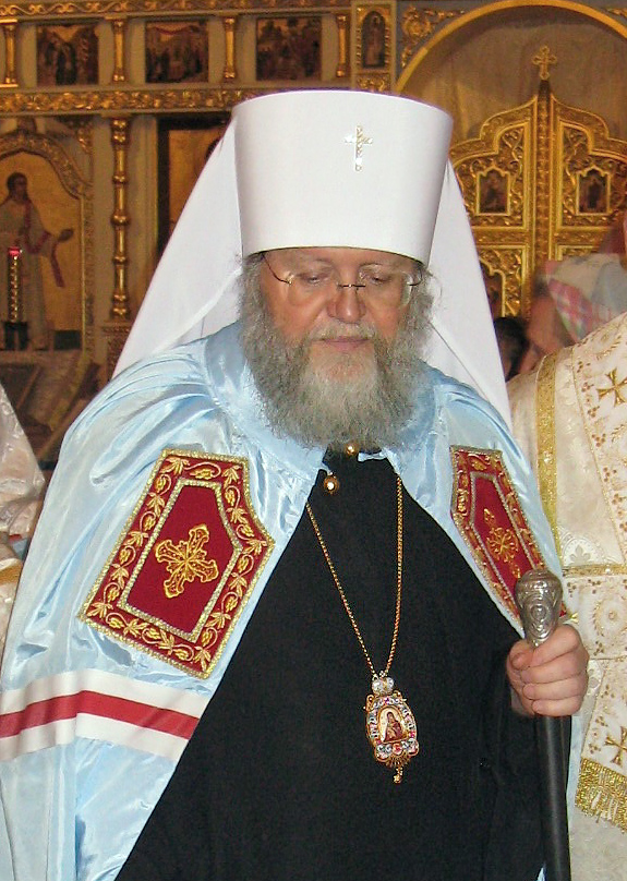 Митрополит Восточно-Американский и Нью-Йоркский Иларион (Капрал) в день своего настолования. 18 мая 2008 года. Фото Павла Дроздовского